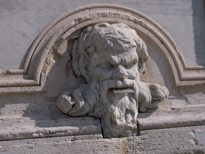 Fontana del Vanvitelli posta al centro delle Mura di Urbano VIII nel porto storico di Civitavecchia